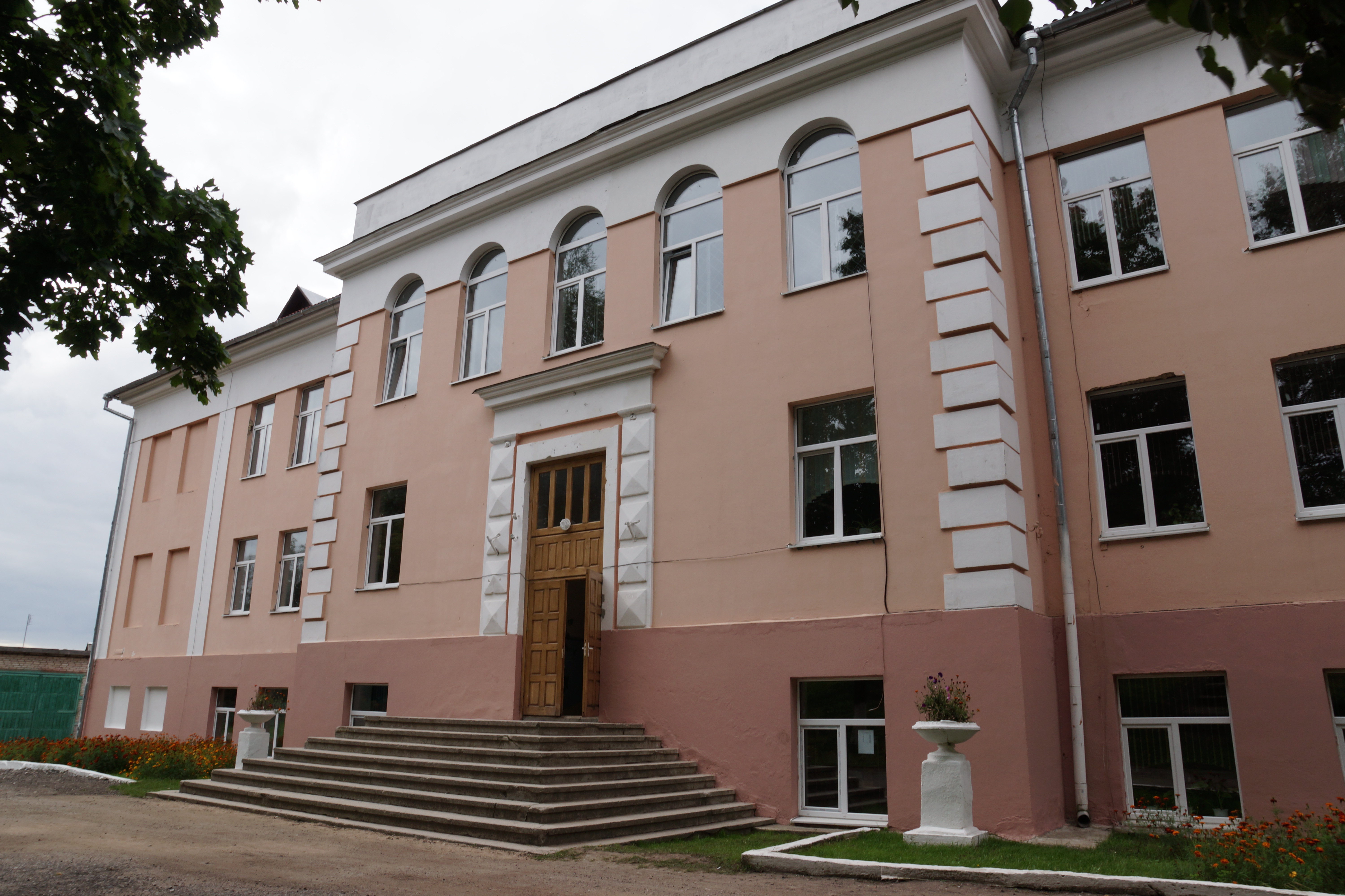 Беларуская (тарашкевіца): Будынак былой Наваградзкай беларускай гімназіі. г. Наваградак This is a photo of Belarusian heritage monument. Reference number: 412Г000439 ( WLM)